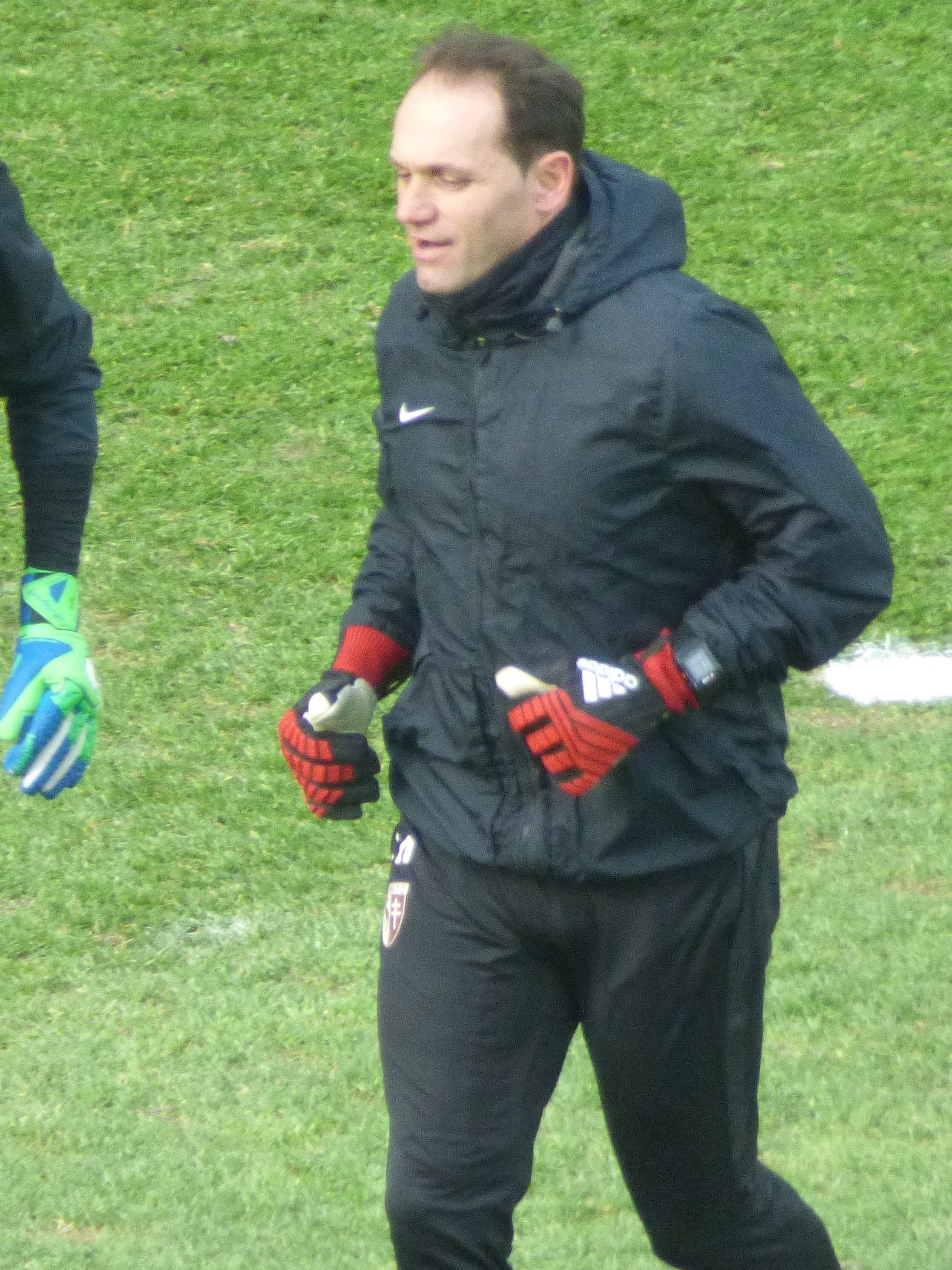 Christophe Marichez avant le match RC Lens / FC Metz, comptant pour la vingt-quatrième journée du championnat de France de Ligue 2 2018-2019, le 9 février 2019, au Stade Bollaert-Delelis.